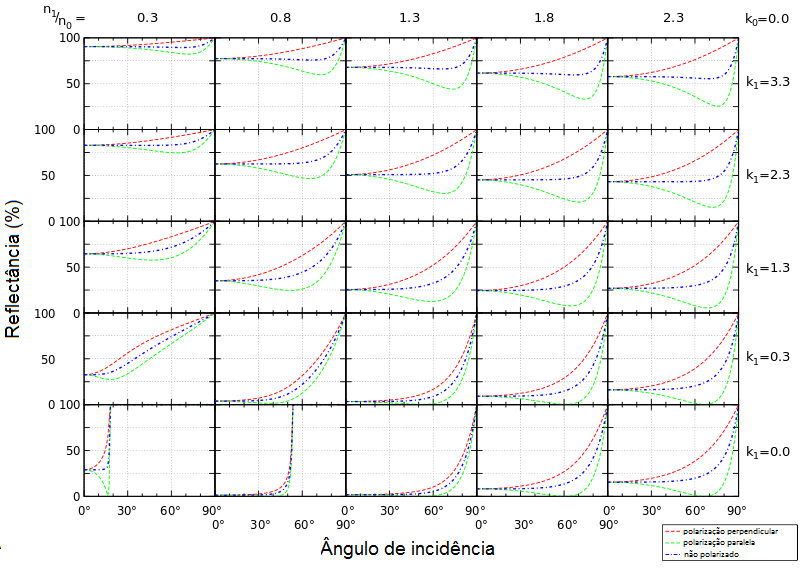 graficos da reflexão de fresnel